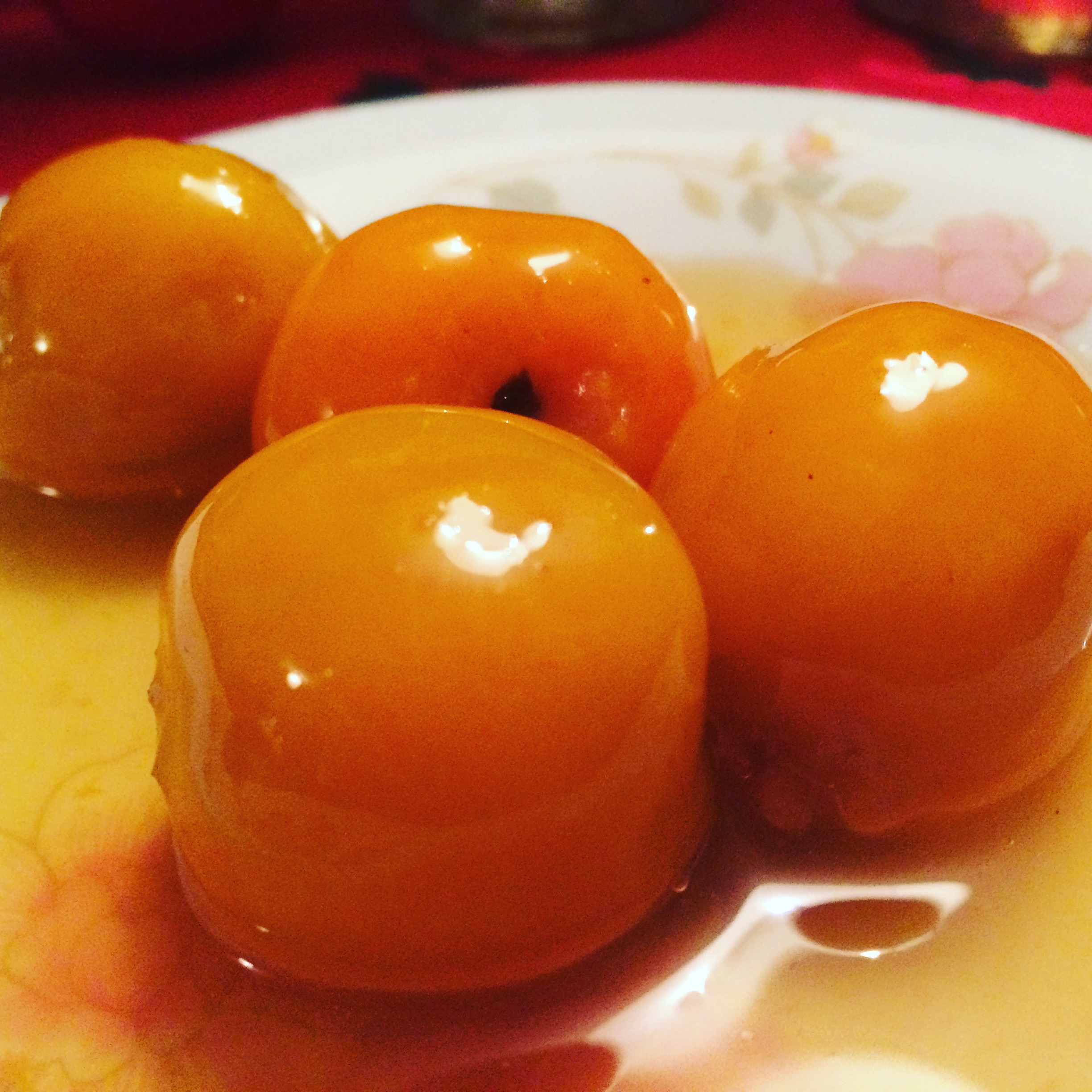 Dulce tradicional mexicano hecho a base de tejocotes.